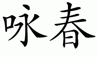 Přepis slov Wing Chun v čínštině.